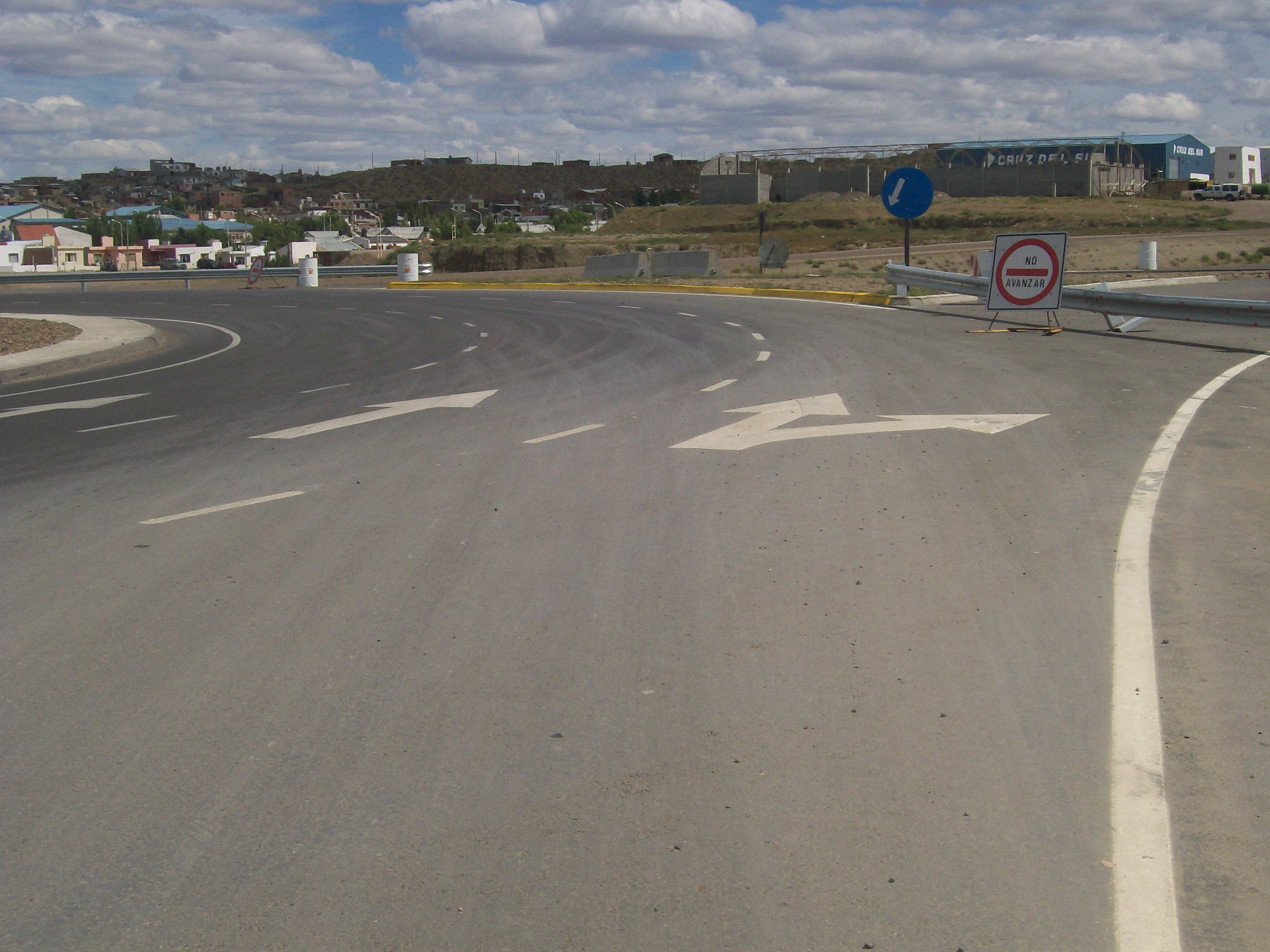 vista a la circunvalacion